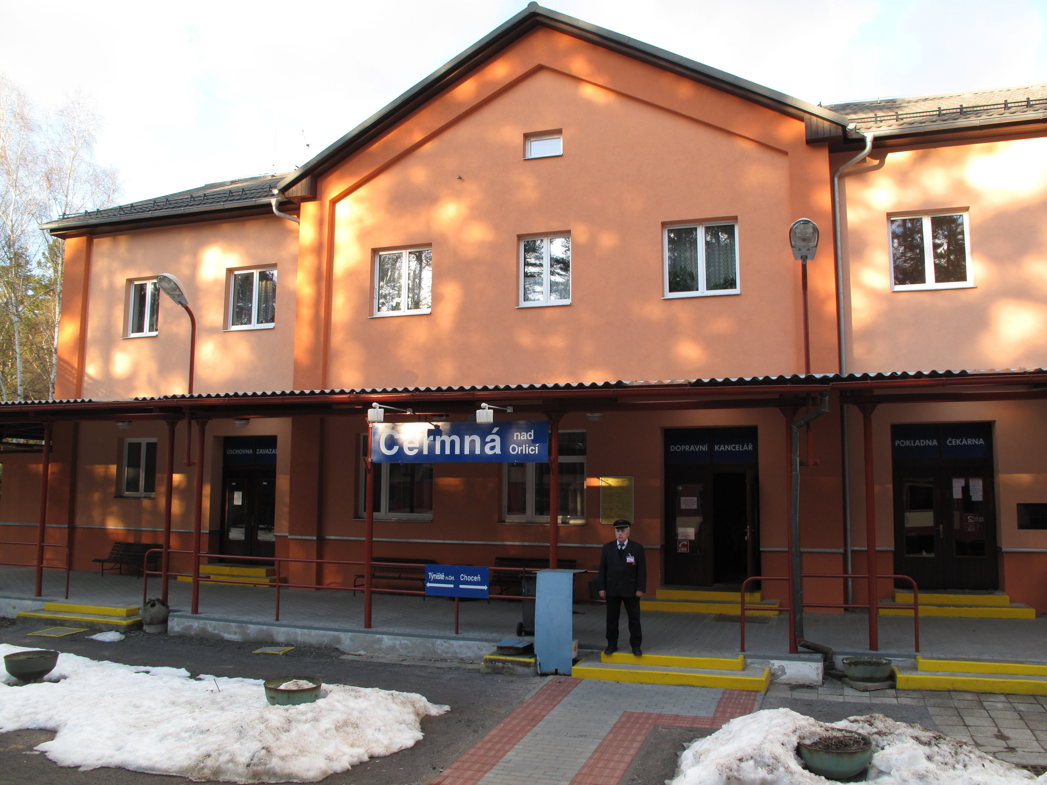 Česky: Čermná nad Orlicí